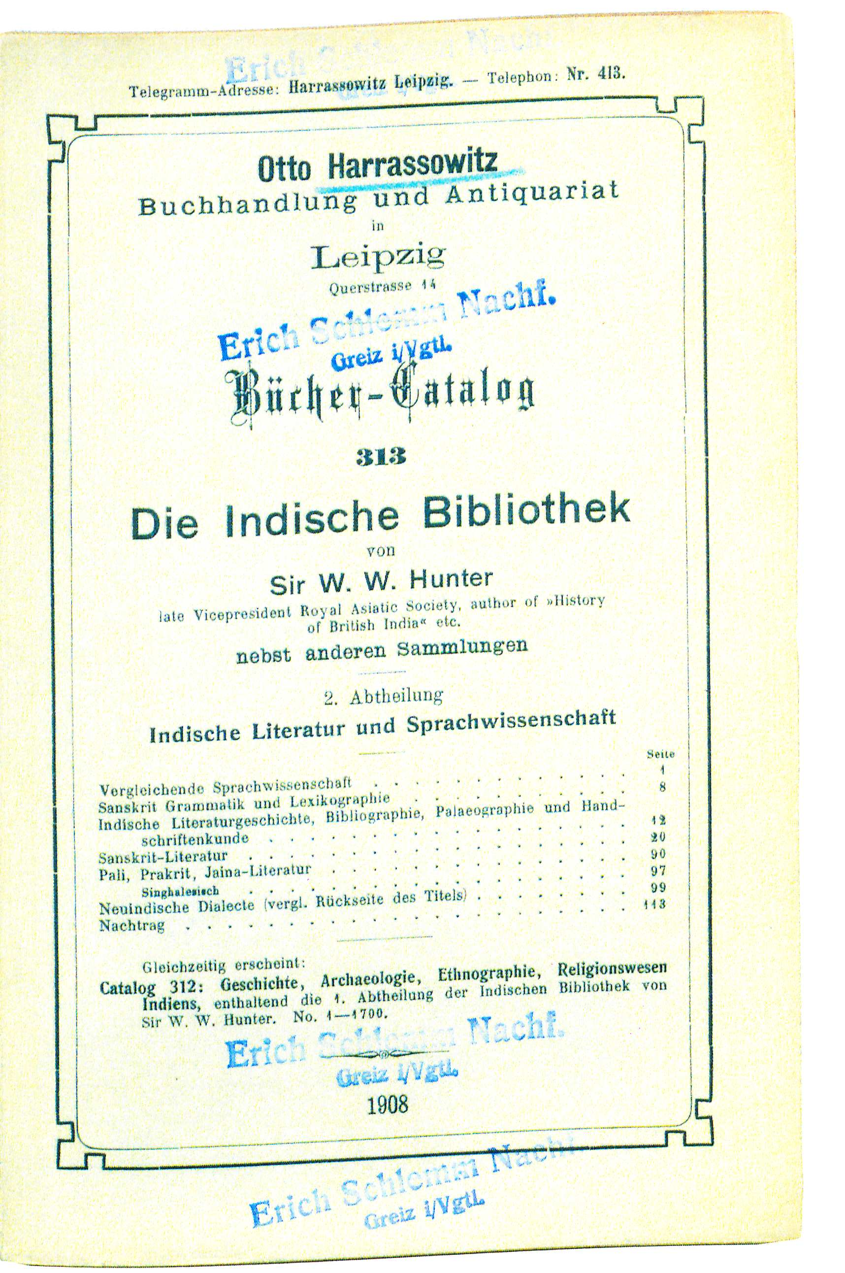 Otto Harrassowitz Antiquariatskatalog 1908